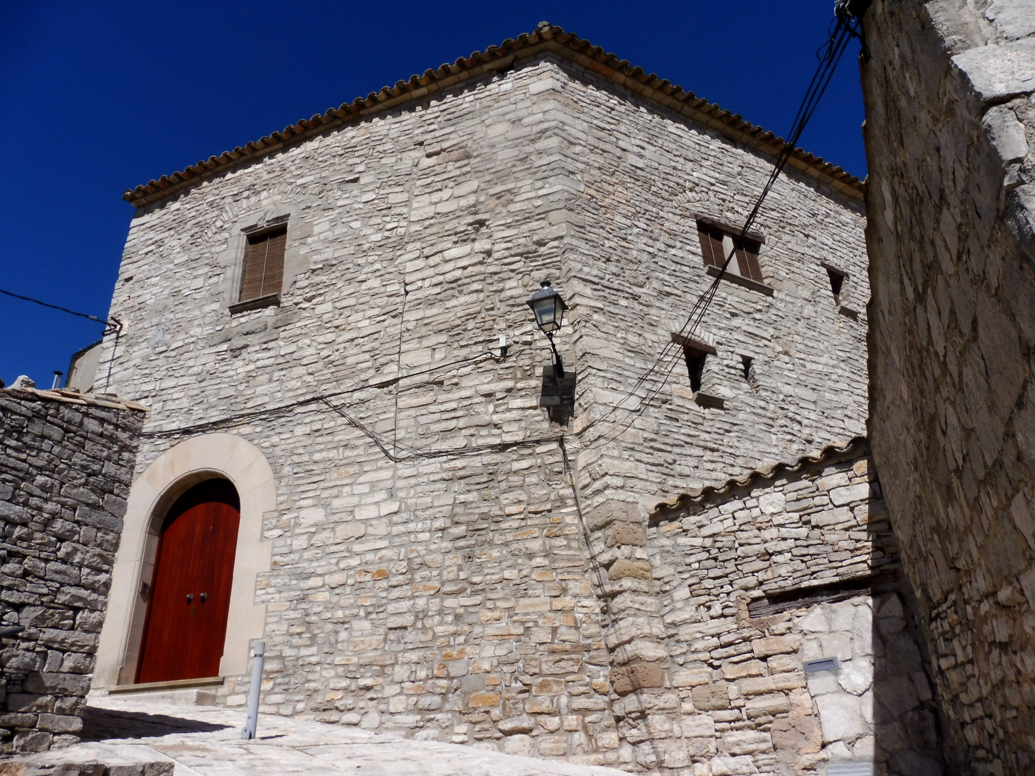 Castell de la Tallada (Sant Guim de Freixenet), façana